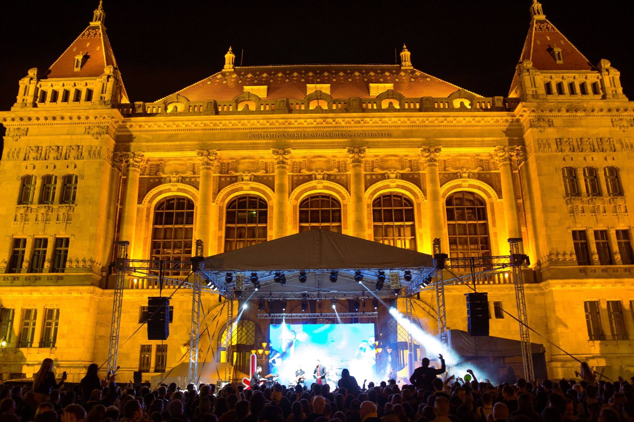 Dunai Regatta 2016 - nagykoncert (fotó: Biró Dávid)